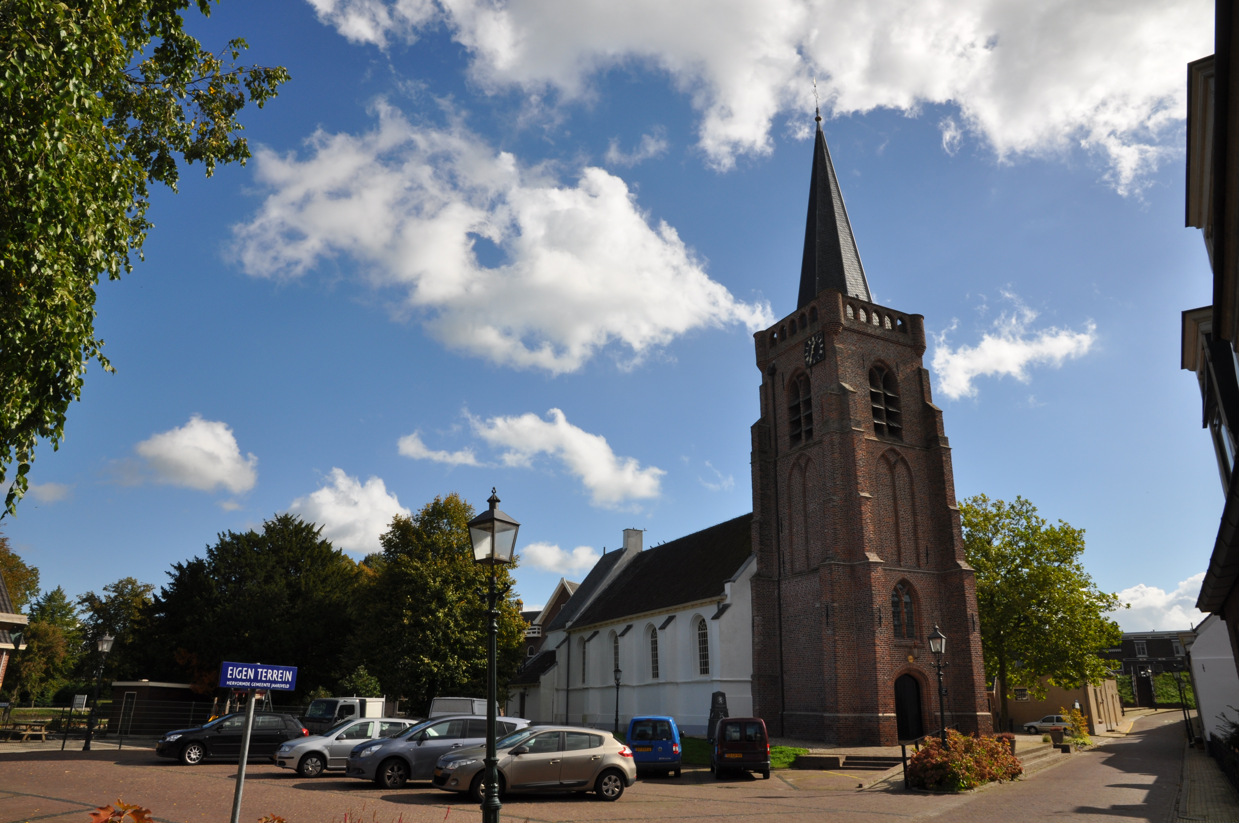 Kerk in Jaarsveld.